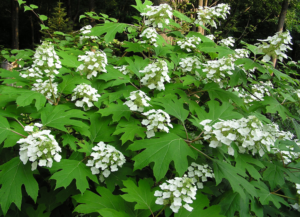 Hydrangea quercifolia - Oakleaf hydrangea